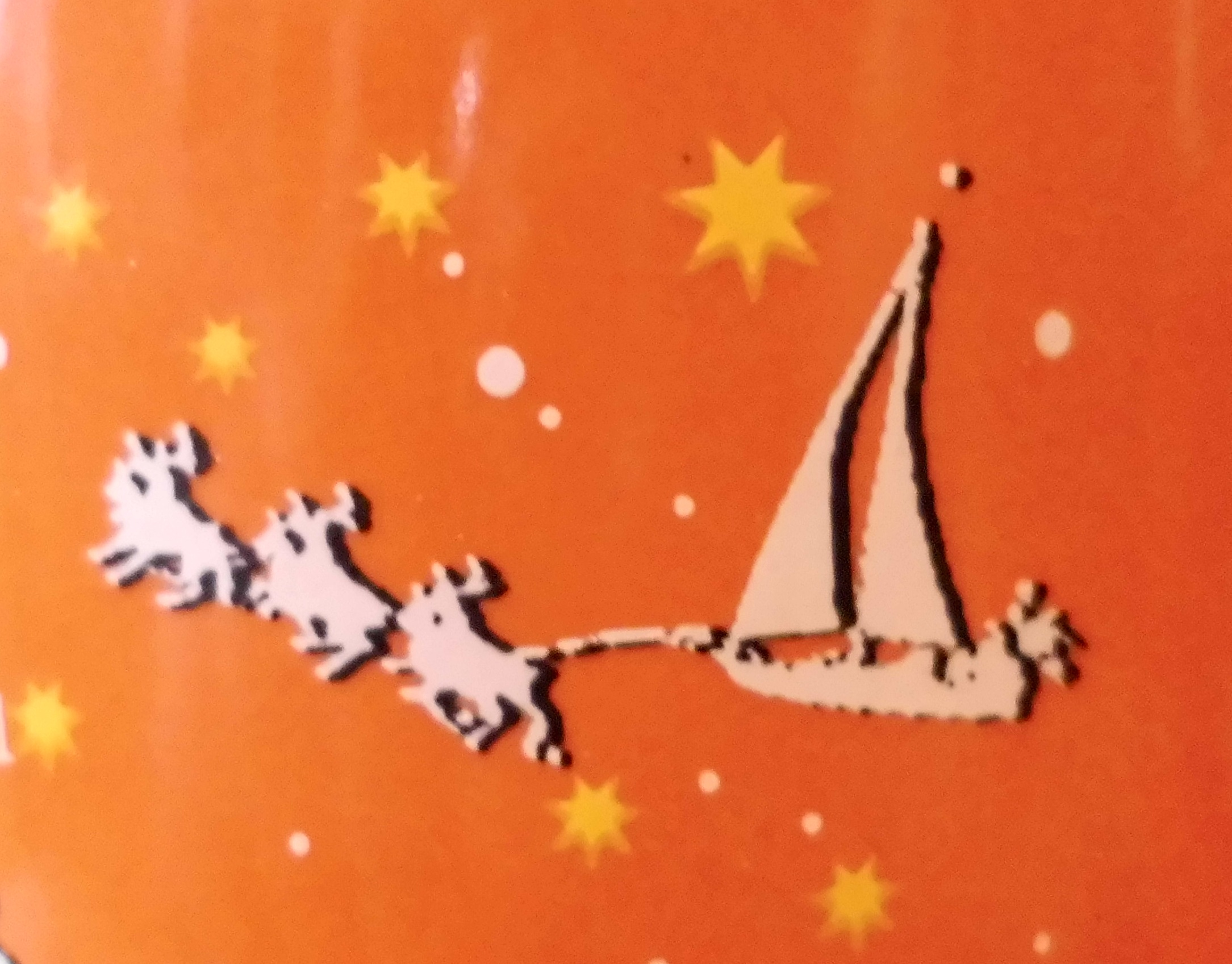 Detailaufnahme des Kieler Weihnachtsbechers aus dem Jahr 2013: Der Weihnachtsmann reist in einer Segeljacht mit vorgespannten Rentieren.